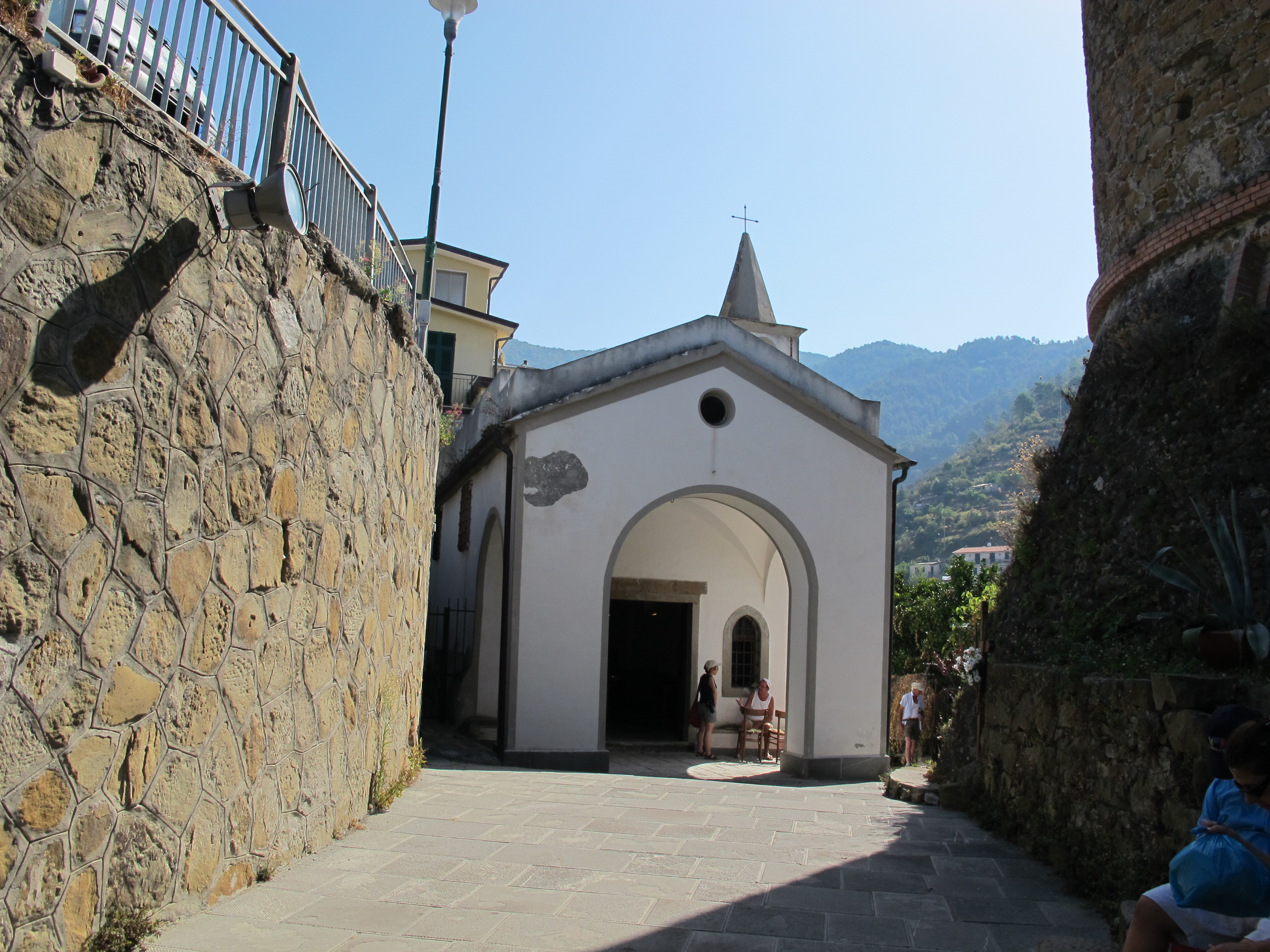 Riomaggiore, Oratorio dei Santi Rocco e Sebastiano al castello